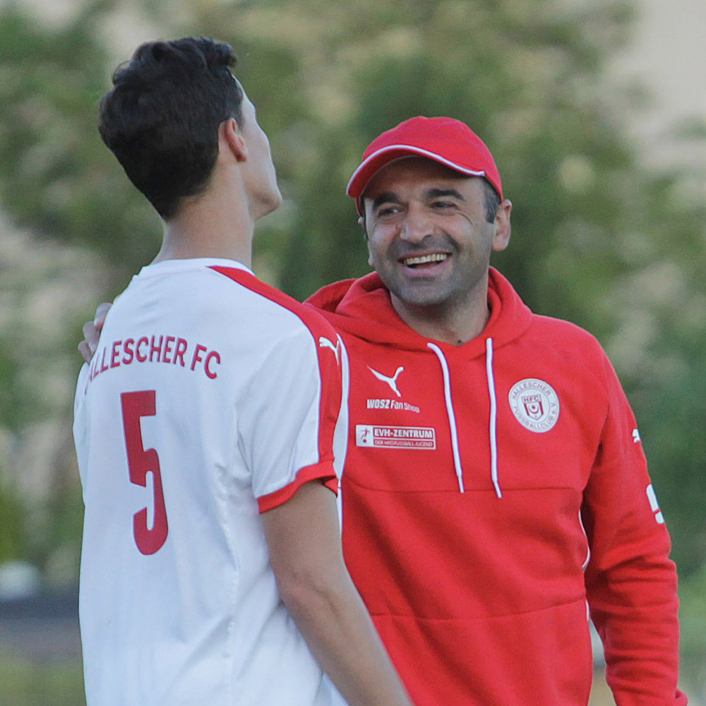 Chwitscha Schubitidse